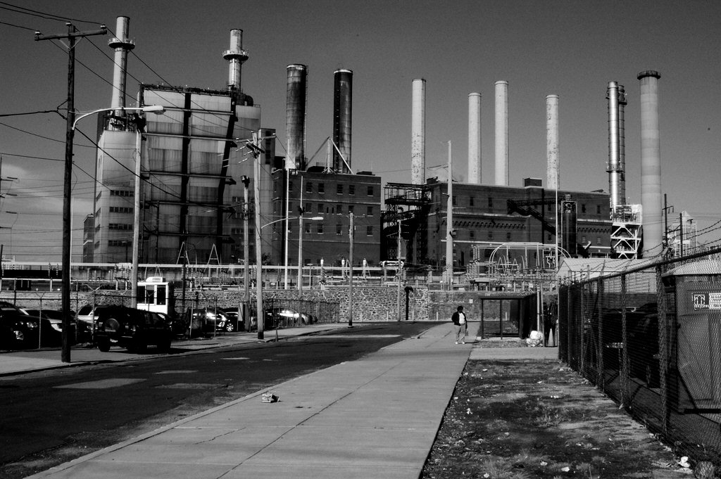 Industrial Philadelphia